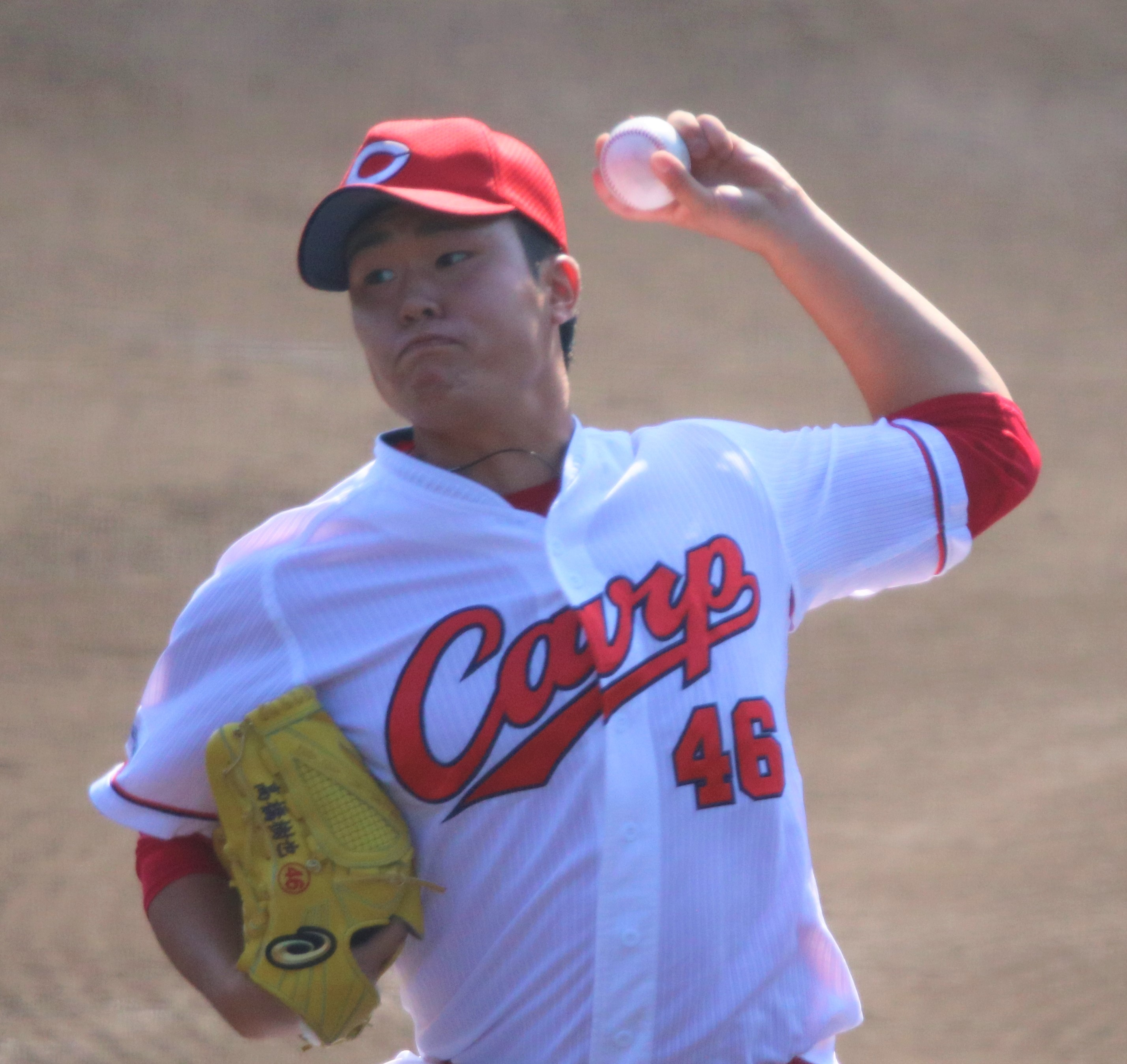 2017/11/9 天福球場にて